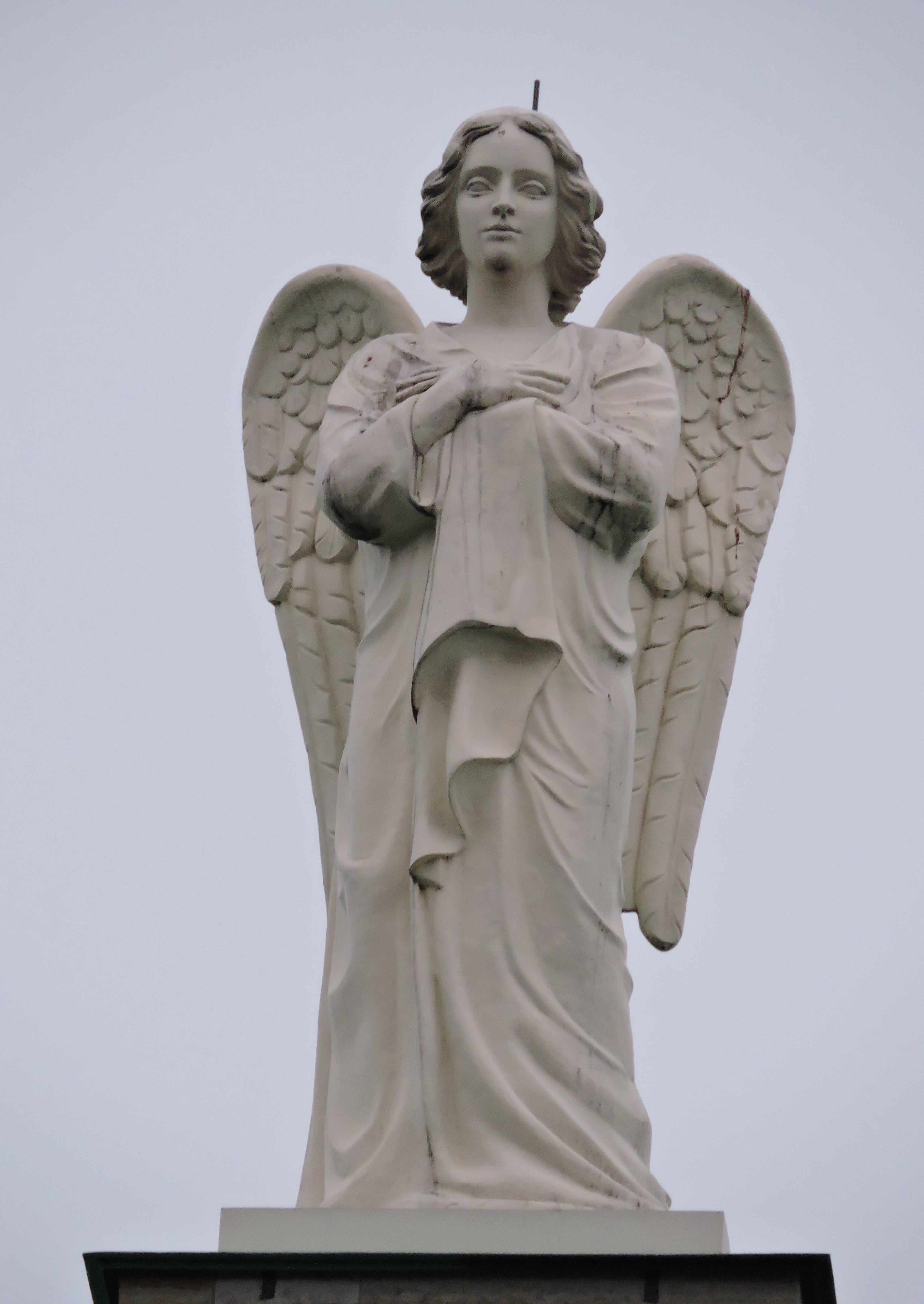 Ангел Мариинской больницы